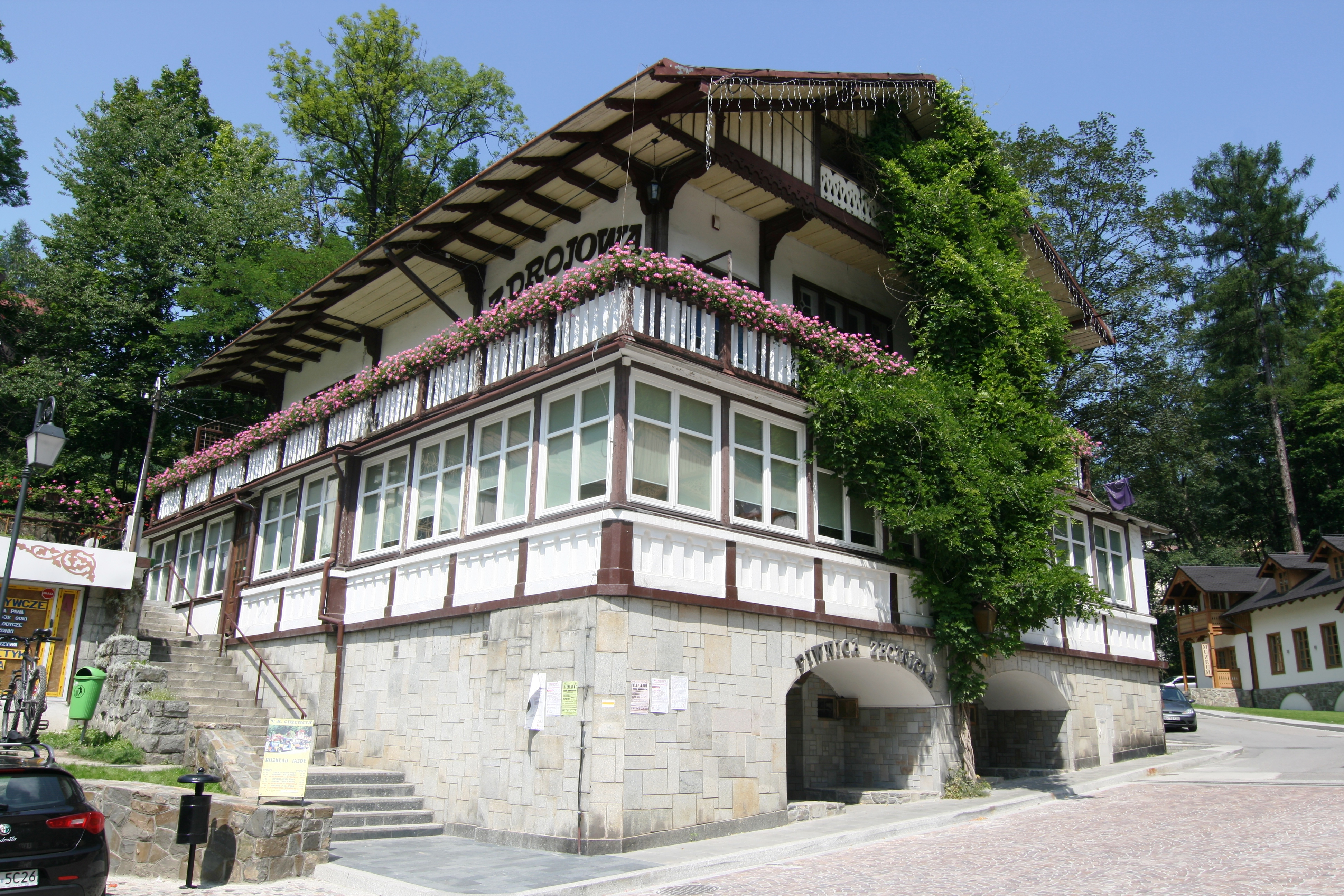 Szczawnica, Plac Dietla - Willa Pod Bogarodzicą (zabytek nr A-1073/M)